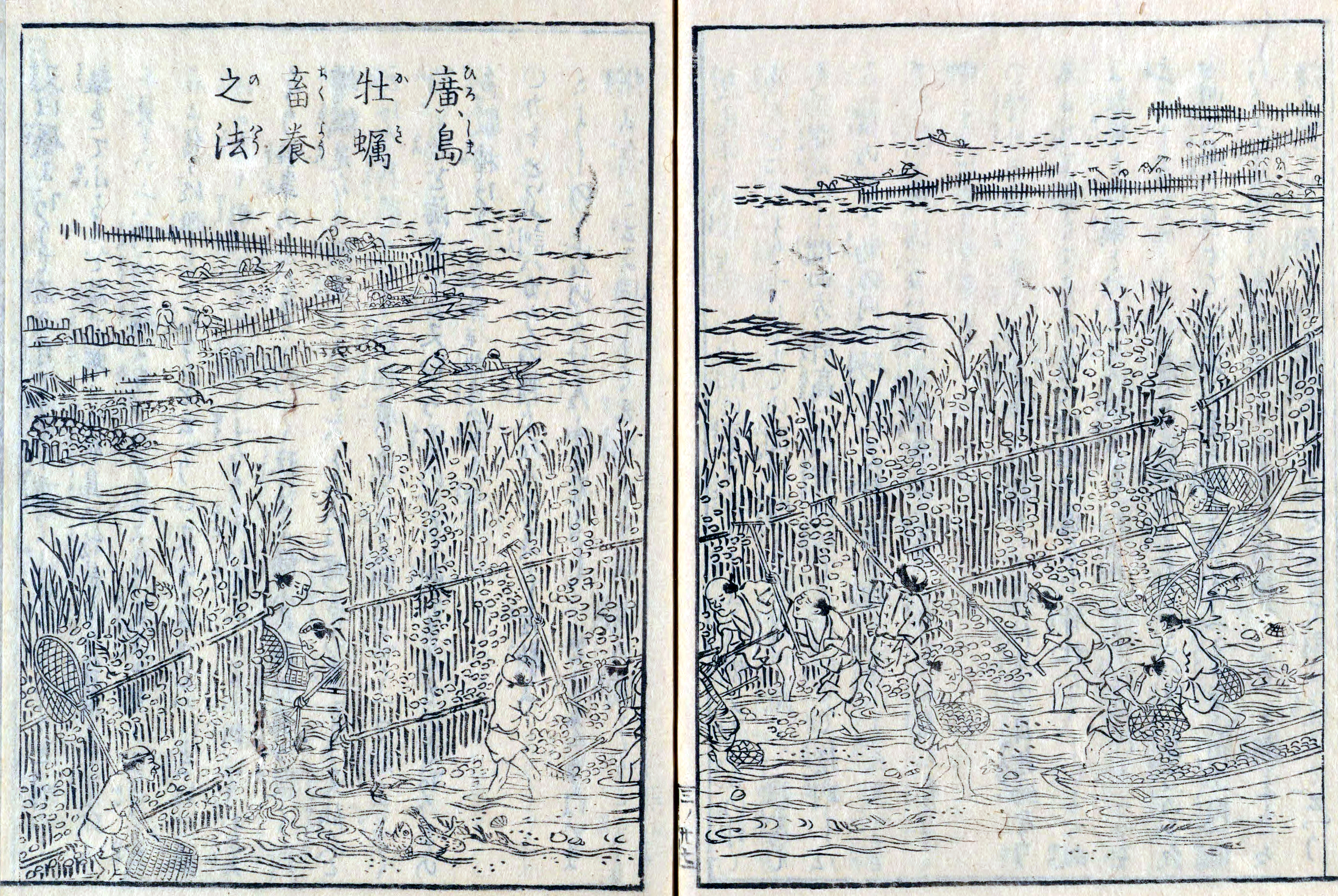 日本山海名産圖會 第三巻 広島牡蠣 広島牡蠣蓄養之法